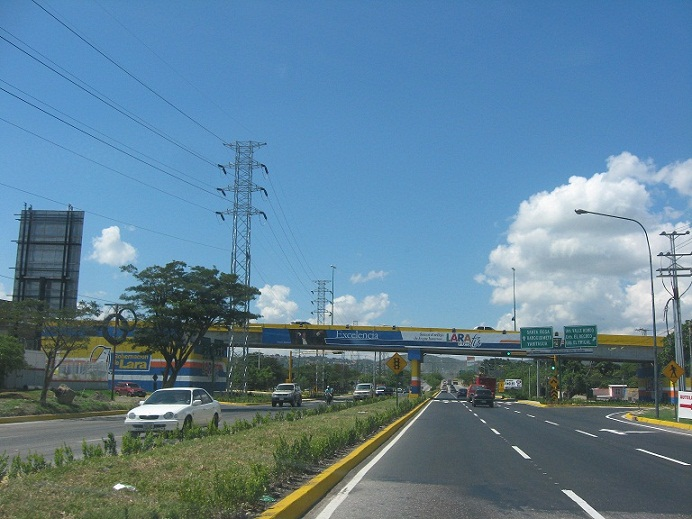 autopista Cabudare-Barquisimeto